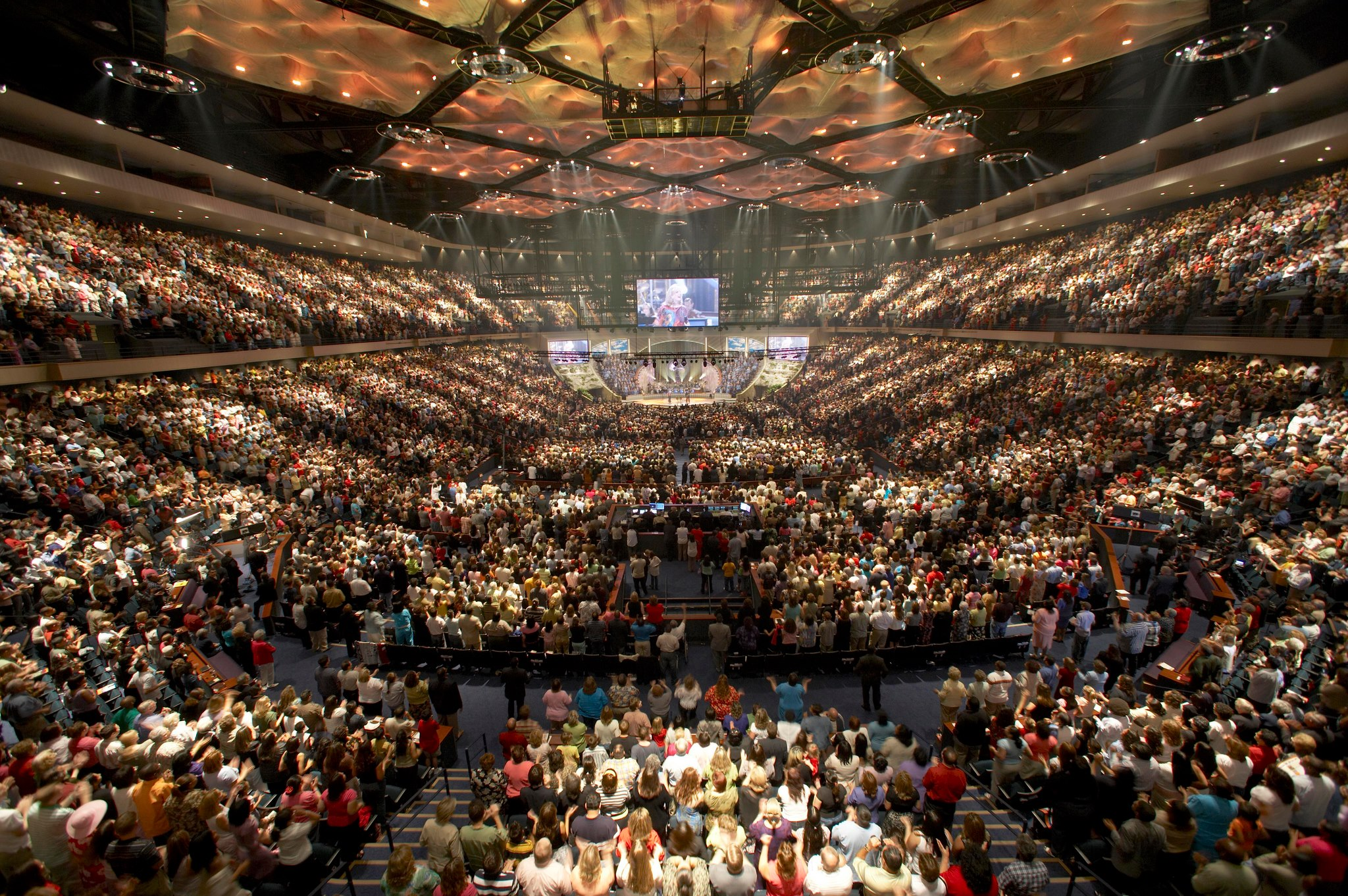 Lakewood Church worship, in 2013